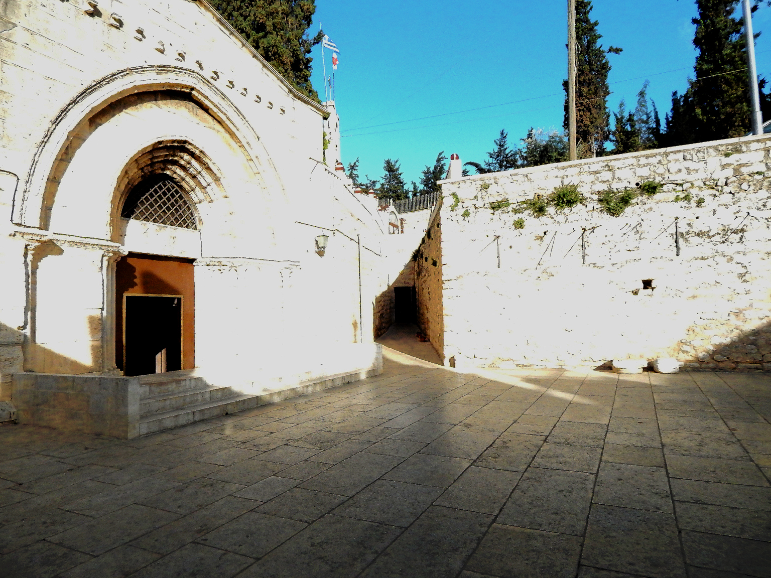 Jerozolima, Grota Pojmania Jezusa, Grota Getsemani